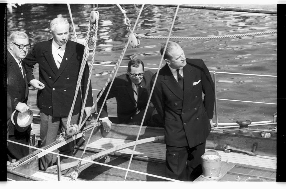 Prinz Philipp (1.v.r.) mit dem Vorsitzenden vom Kieler Yacht-Club (KYC) Hans Carl Rüdel (4.v.r.) und dem KYC-Wettfahrtleiter der Kieler Woche Otto Schlenzka (3.v.r.) an Bord seiner Yacht BLOODHOUND (brit.) im Alten Olympiahafen.